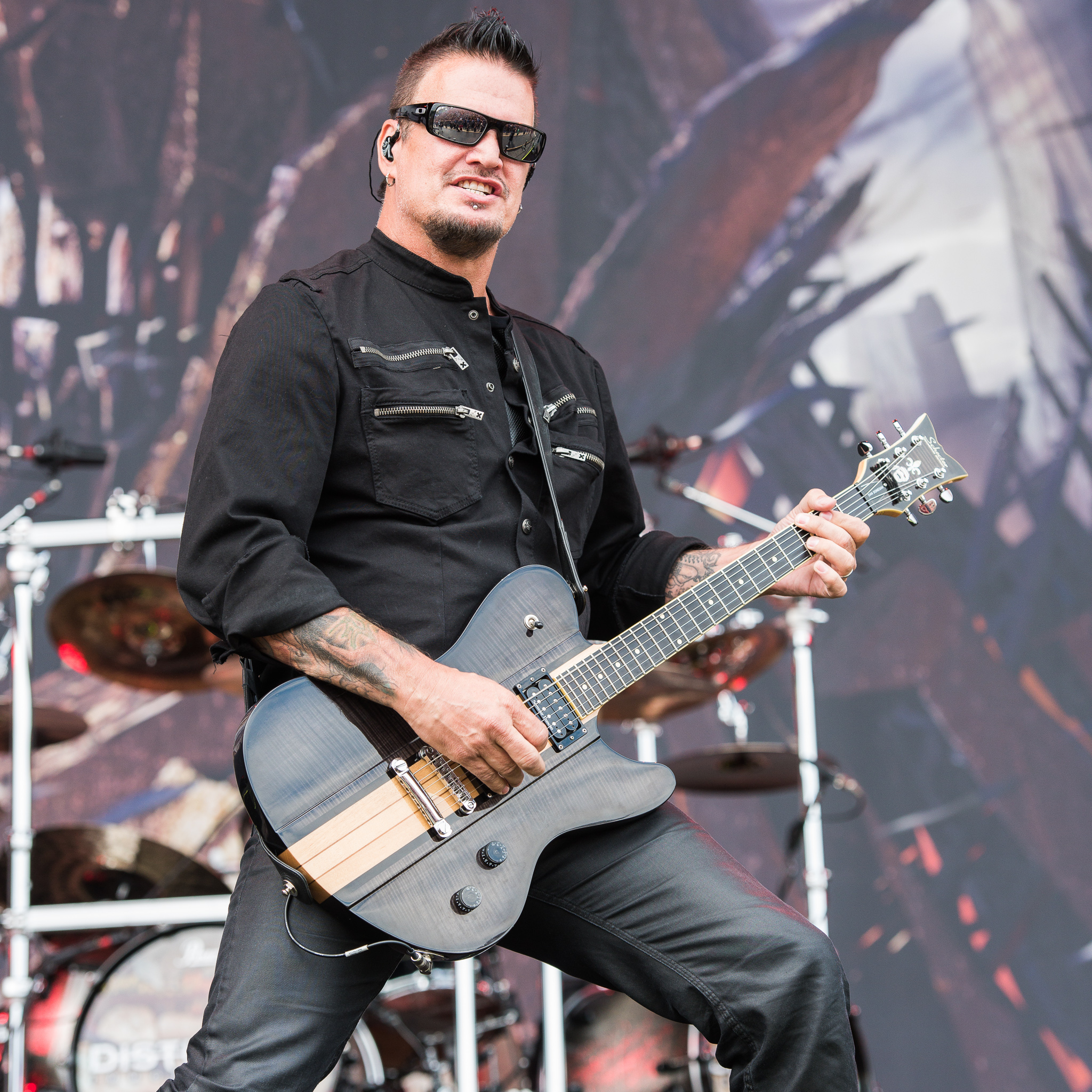 ARGO-Konzerte,Dan Donegan,Disturbed,Festival,Konzert,Livekonzert,Livemusik,Musik,RiP,Rock im Park 2016,Seat Zeppelin Stage